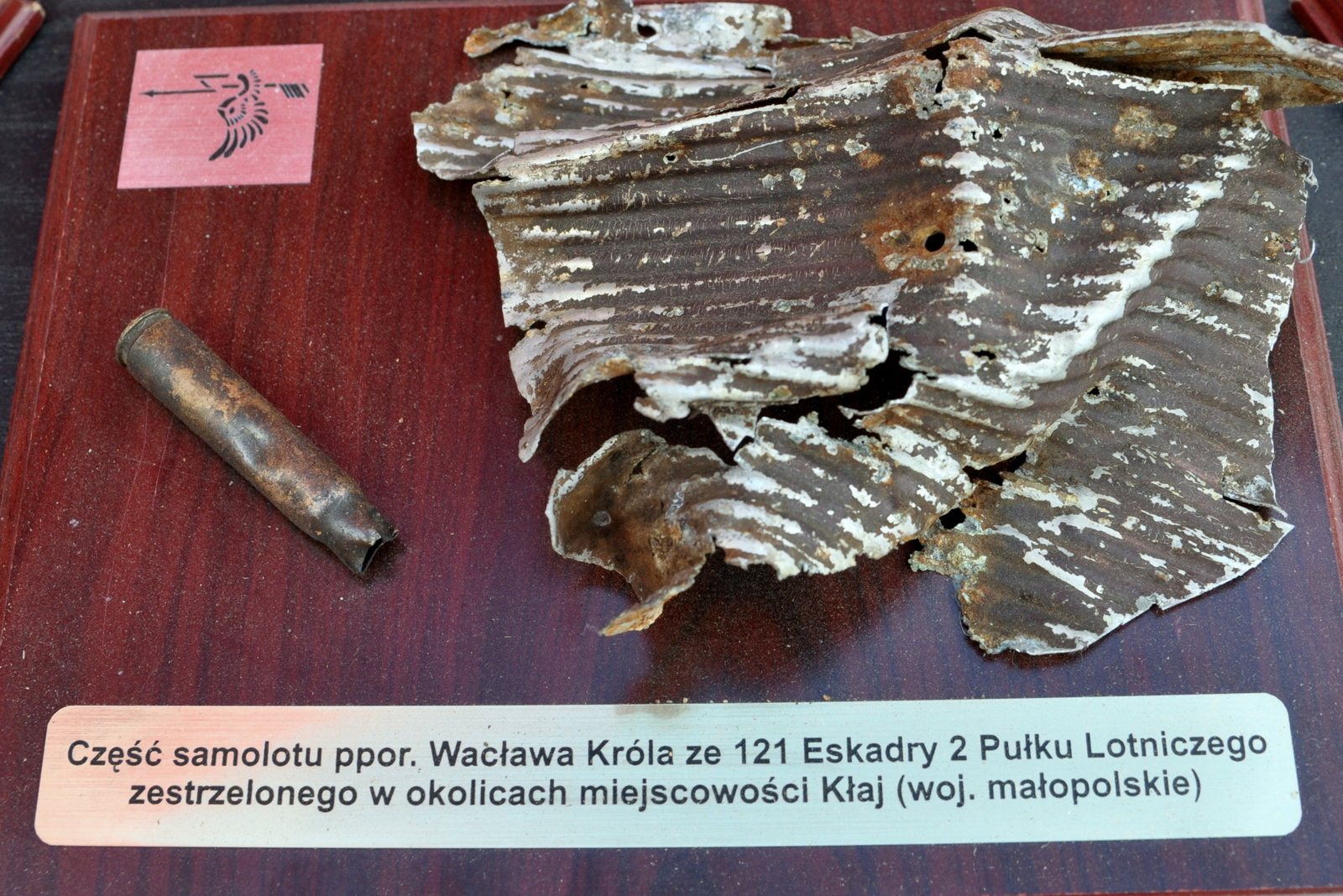 ppor. Wacław Król został zestrzelony 3 września 1939 r. ( po walce z Heinklem He 111 ). Uratował się skacząc ze spadochronem. Szczątki jego samolotu, PZL P.11c, wydobyto z miejsca rozbicia w kwietniu 2012 r.